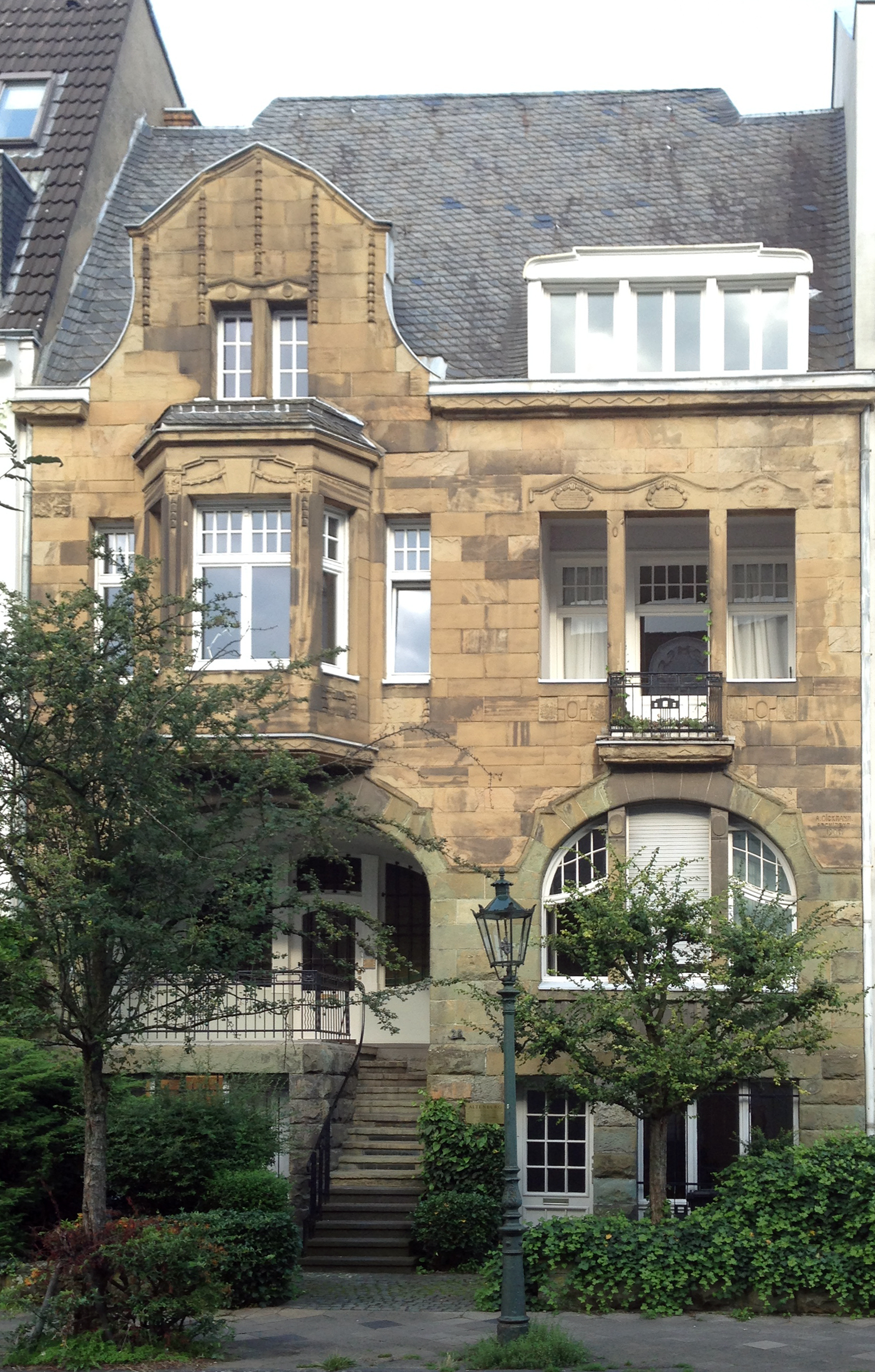 Haus Barmer Straße 28, Düsseldorf-Oberkassel, Architekt und ehemaliger Eigentümer Adam Dickmann (1876–1961)